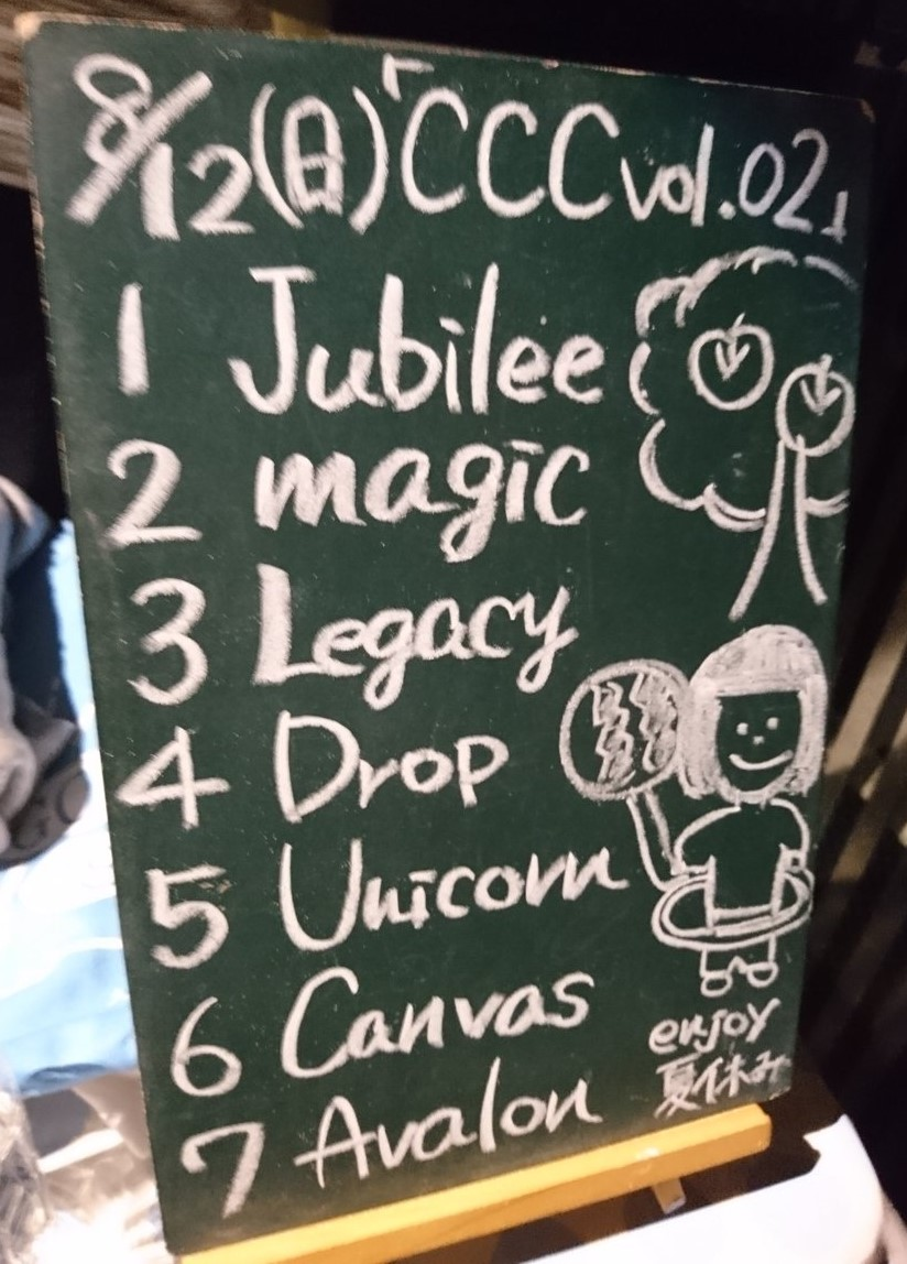 amiinAセトリボード(20180812(1))